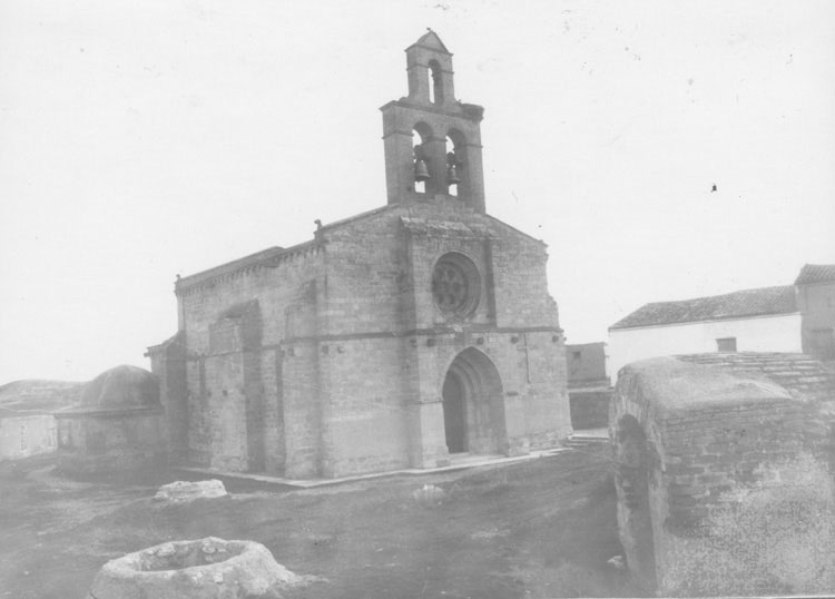 Iglesia parroquial. Ermita de San Juan - Castronuño (Valladolid) - Álbum 200 x 140 - Fotografía. Papel 110 x 80 B/N